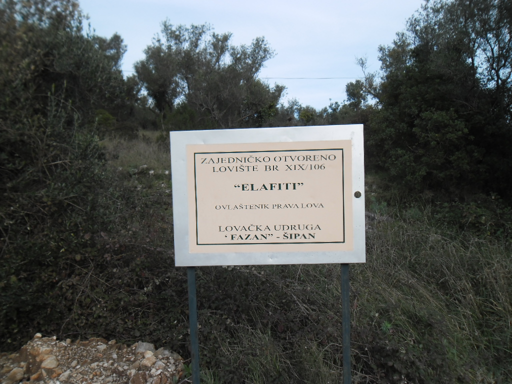 oznaka lovačkog područja na otoku Šipanu